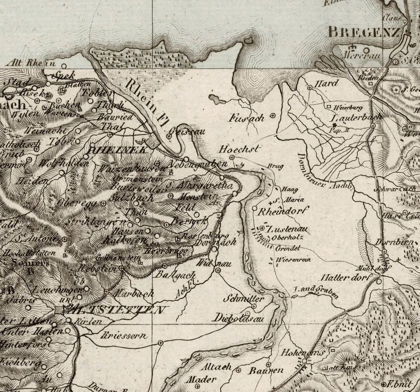 Carl Ferdinand Weiland, Karte der Schweiz, Ausschnitt oberes Rheintal